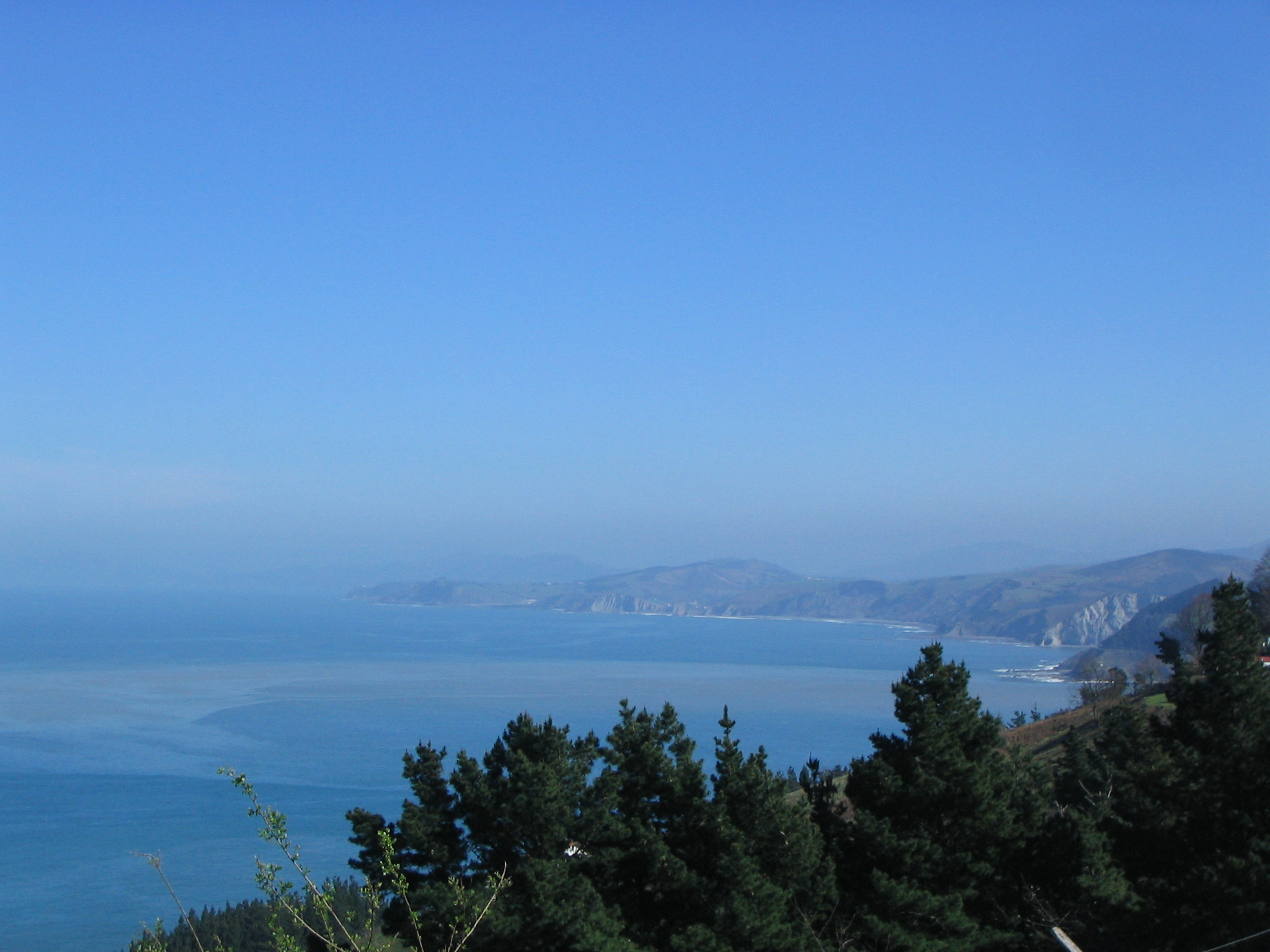 Vista general de la cota guipuzcoana en el País Vasco (España).